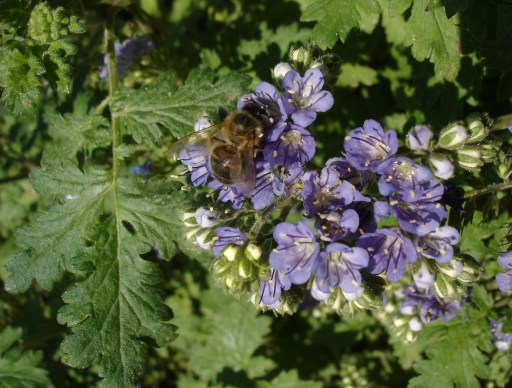 Phacelia congesta, Jardin des plantes, Paris